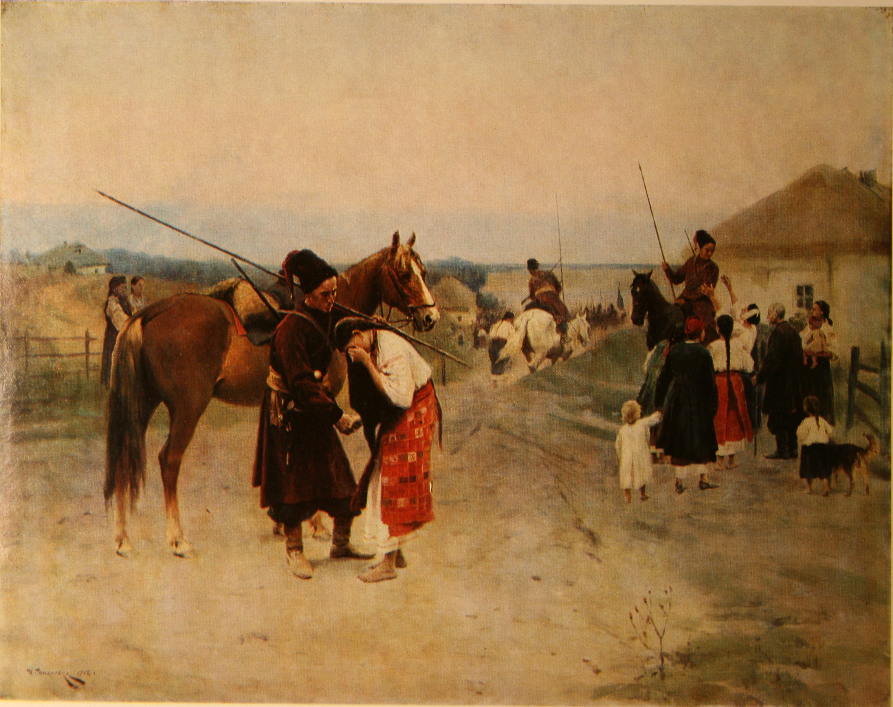 У похід